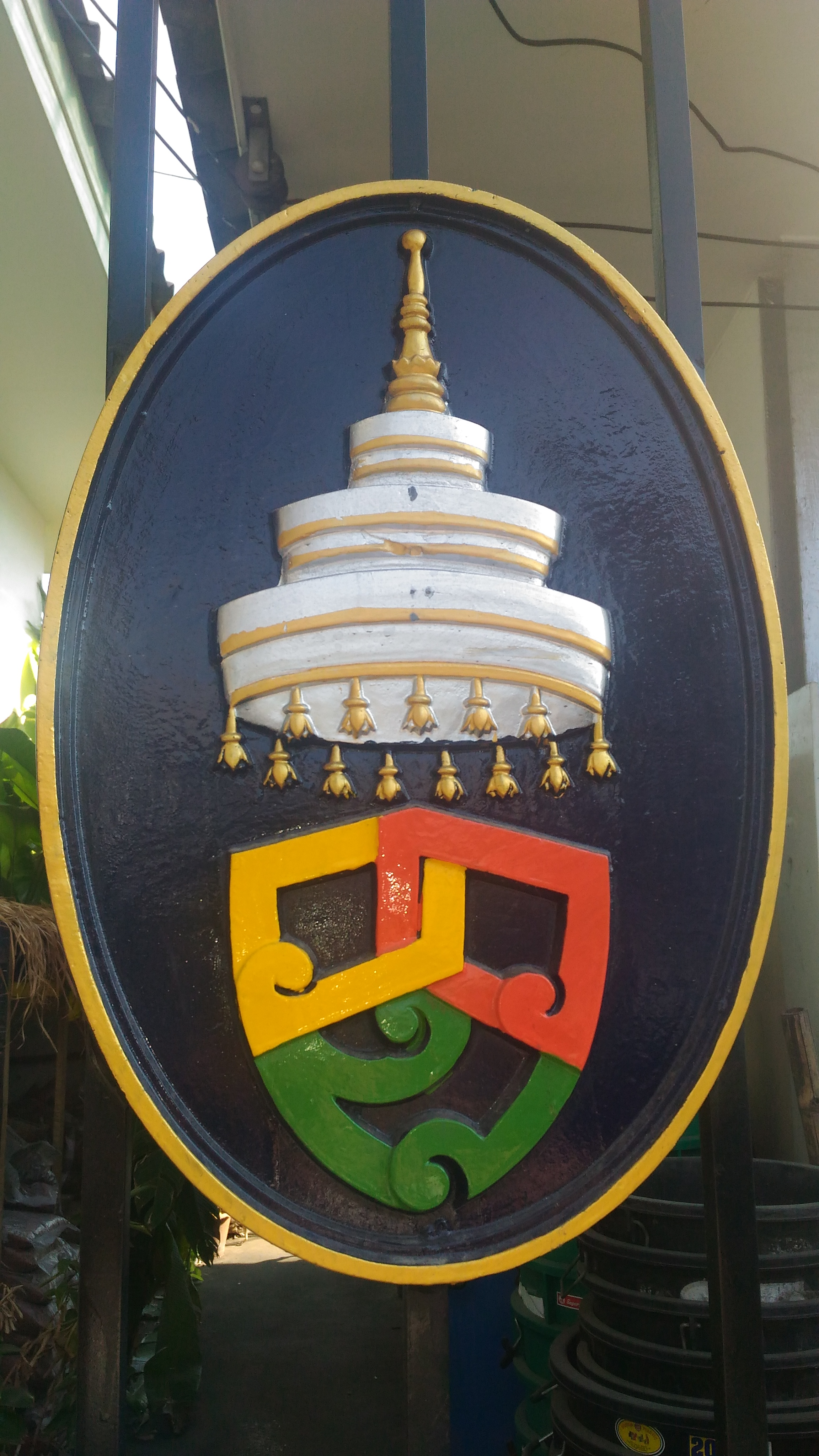 ตราอักษรพระนามย่อ ว.ว.น. ของสมเด็จพระอริยวงศาคตญาณ สมเด็จพระสังฆราช (วาสน์ วาสโน นิลประภา) สมเด็จพระสังฆราชพระองค์ที่ ๑๘ แห่งกรุงรัตนโกสินทร์ สถิต ณ วัดราชบพิธสถิตมหาสีมาราม บันทึกภาพจากรั้วโรงเรียนมัธยมวัดราชบพิธ